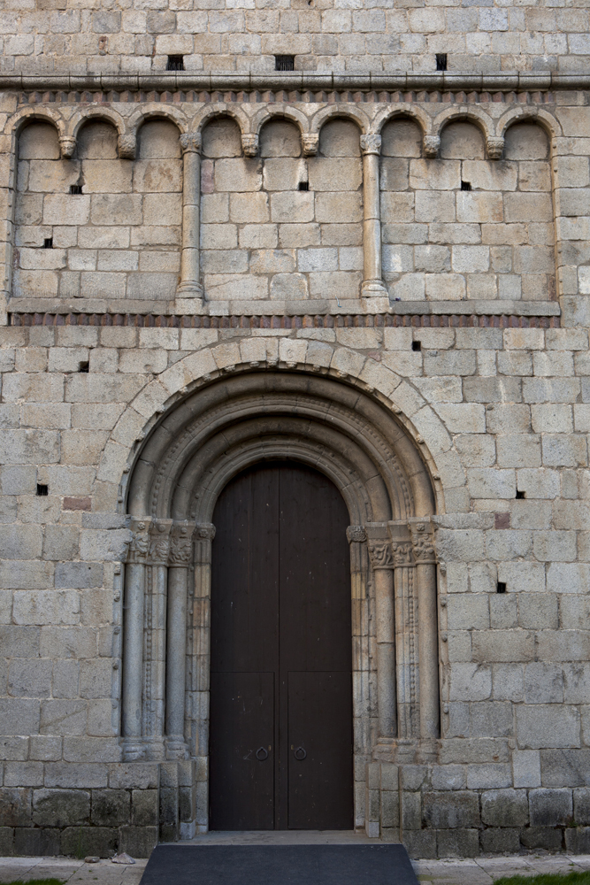 unidentified Spain